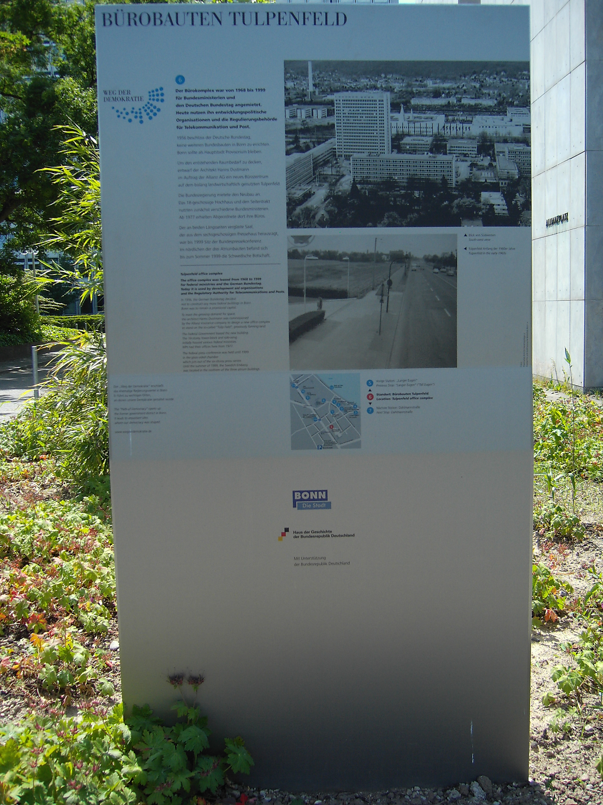 Schild vom „Weg der Demokratie“ vor dem Tulpenfeld-Hochhaus, dem Sitz der Bundesnetzagentur. Es befindet sich im Bonner Bundesviertel.